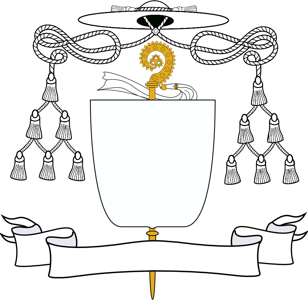 Timbre de l'écu d'abbé prémontré